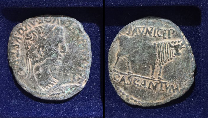 K. o. II. mendeko, Municipium Cascantum hiriko txanpona.Tiberio enpreadorearen burua erakusten du aurrealdean eta zezena atzealdean. @jr lop-lar erabiltzailearen txanpon bildumako argazkia.